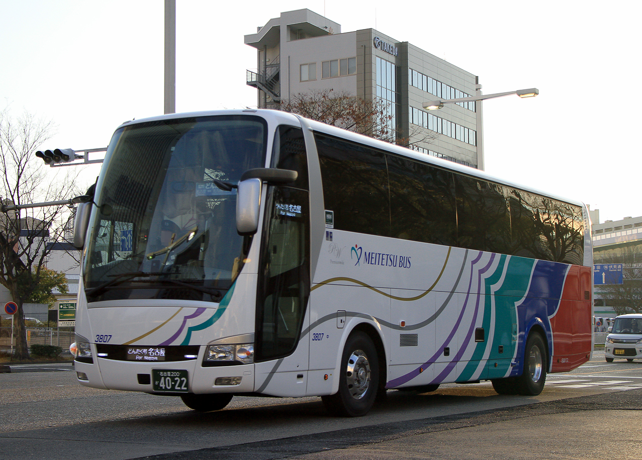 登録番号 名古屋200か40-22 車番：3807 名鉄バス㈱名古屋中央営業所所属 夜行高速用車両 2019年1月 名古屋市内にて撮影 撮影者 Zondag2000